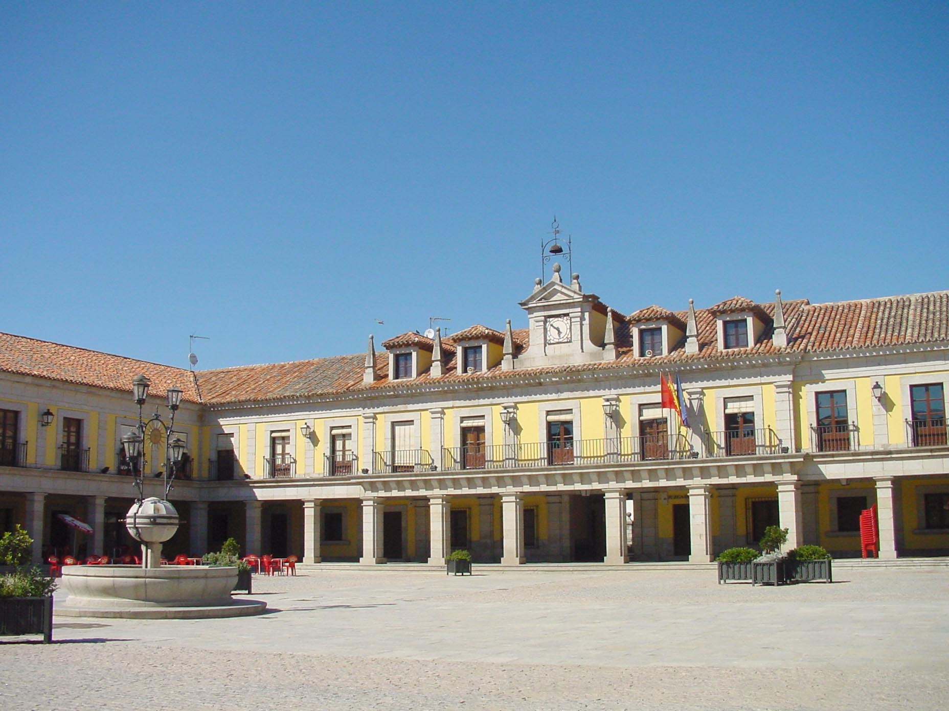 Ayuntamiento y Plaza Mayor de Brunete.